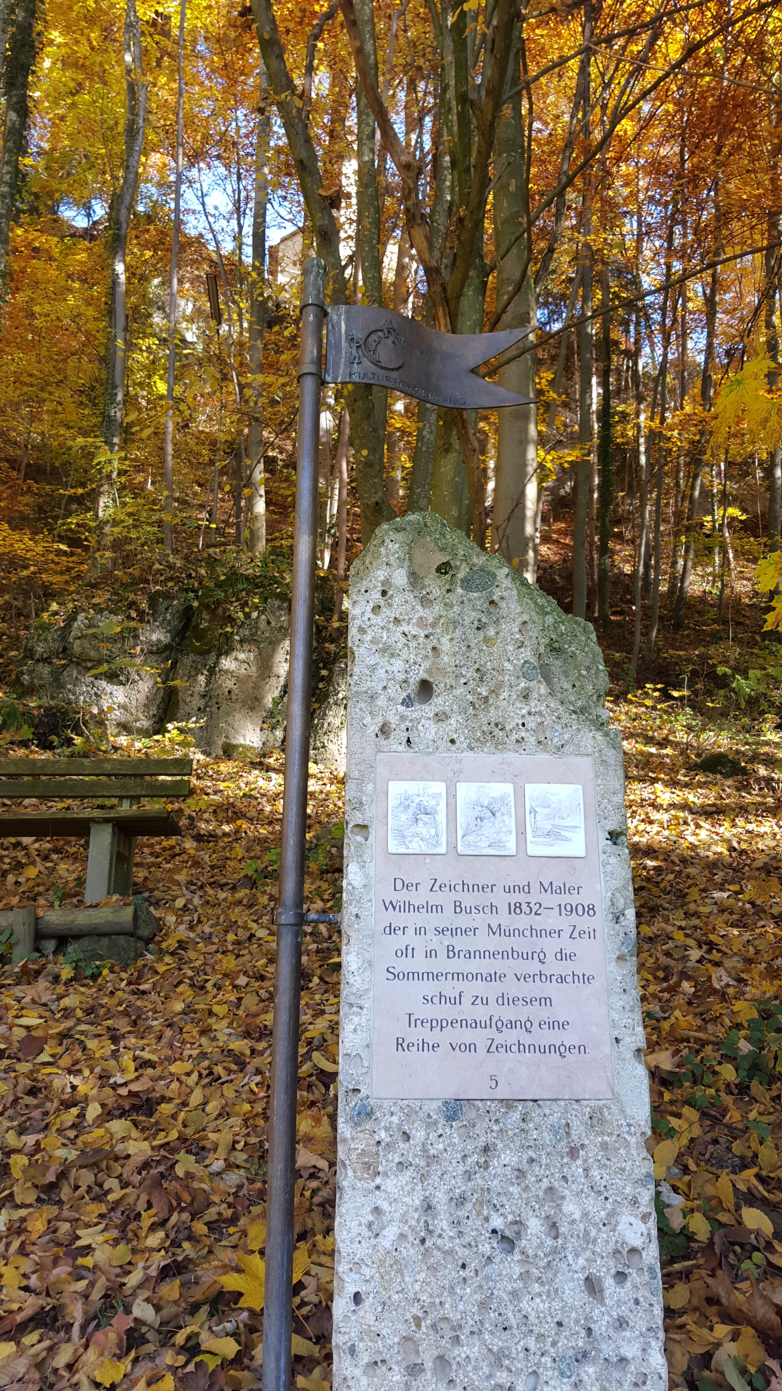 Neue Künstlerkolonie Brannenburg - Kulturspaziergang: Station 5 - Weg zur Kirche St. Magdalena